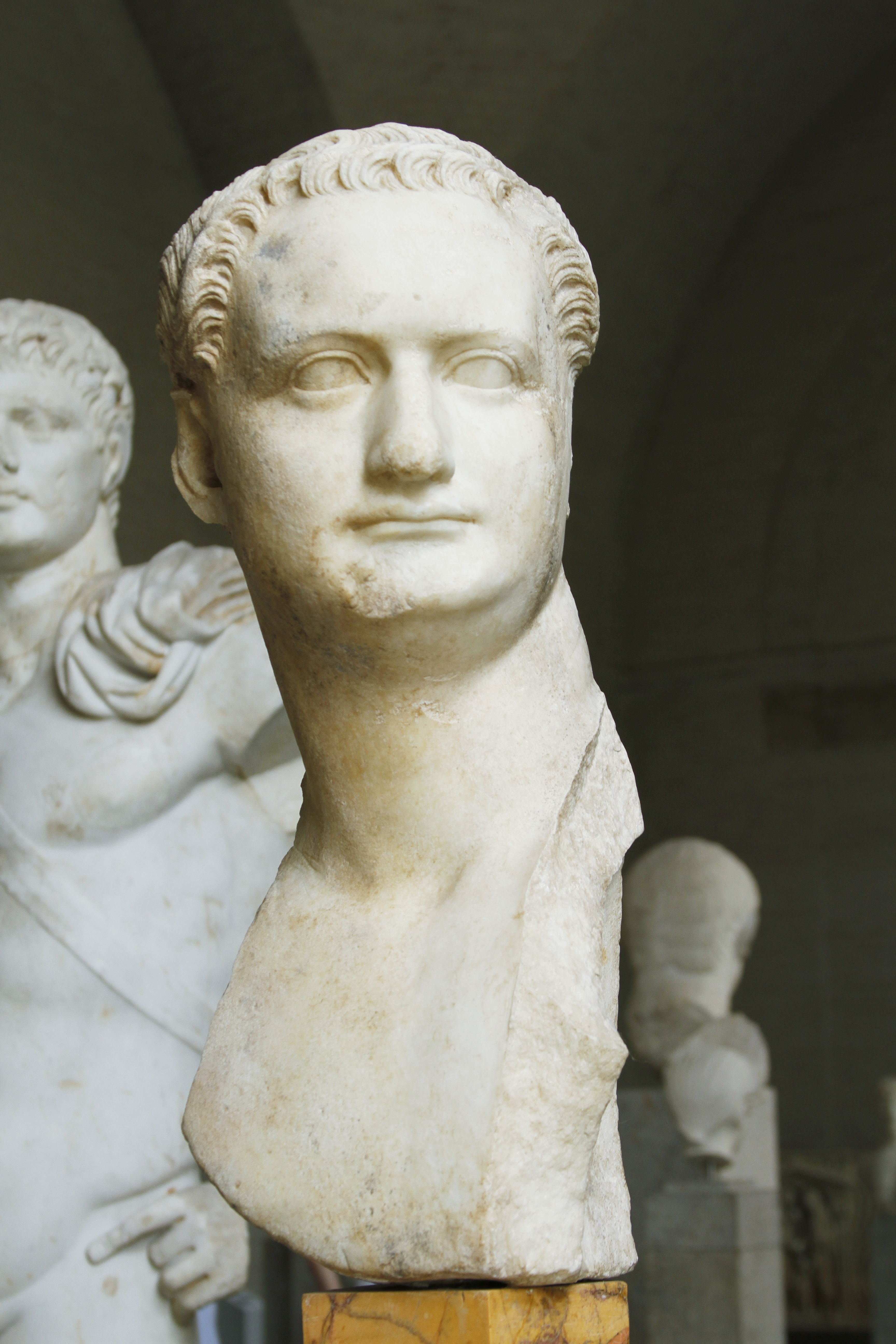 Glyptothek - Munich - Germany